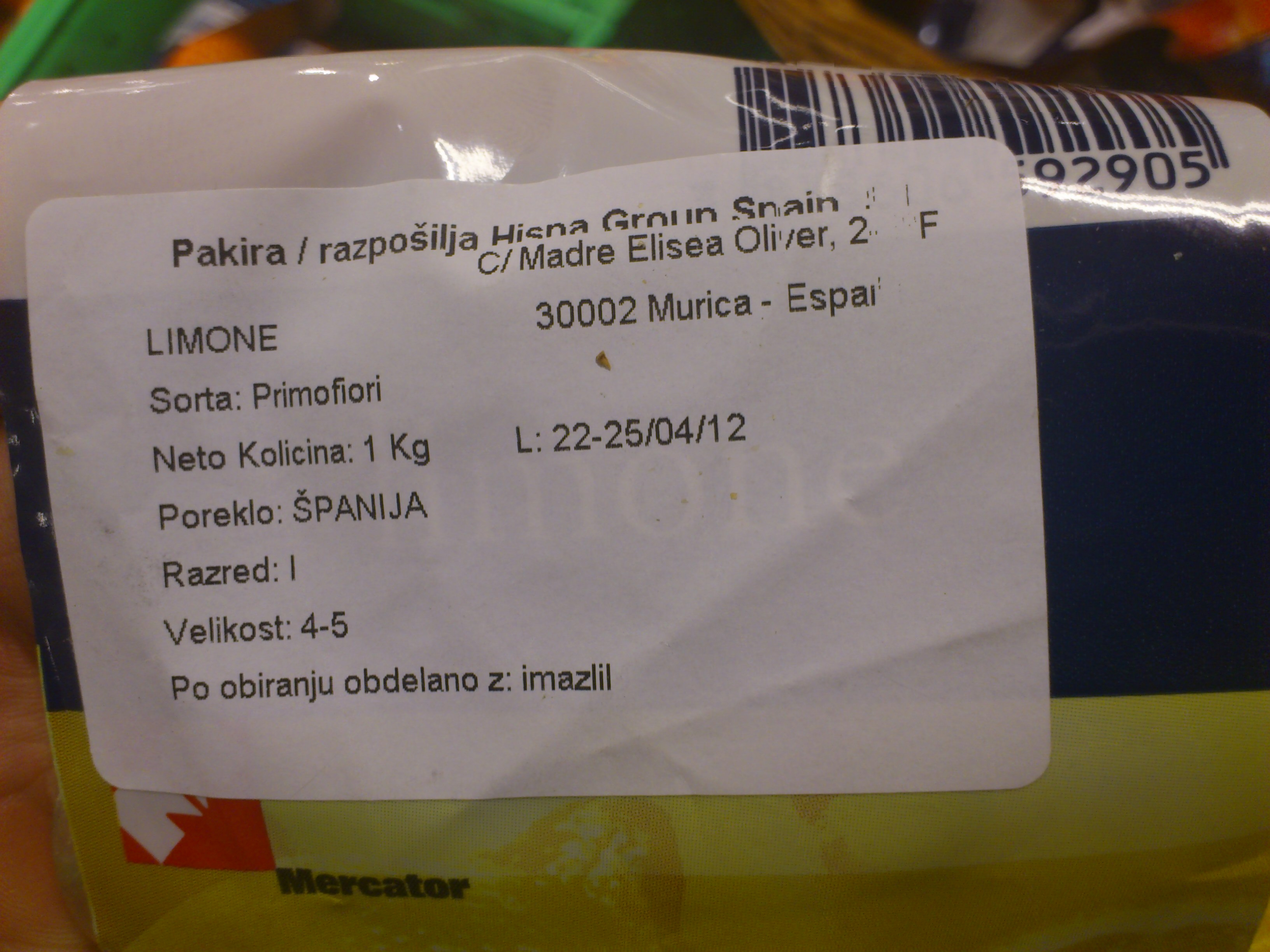 deklaracija imazalil na zavitku limon v trgovini